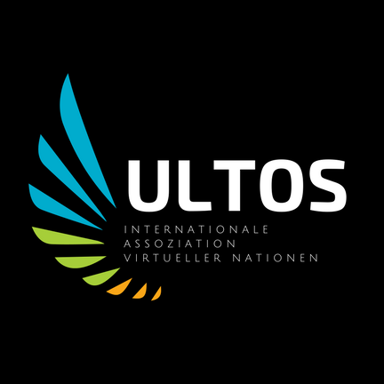 Logo der IAVN Ultos